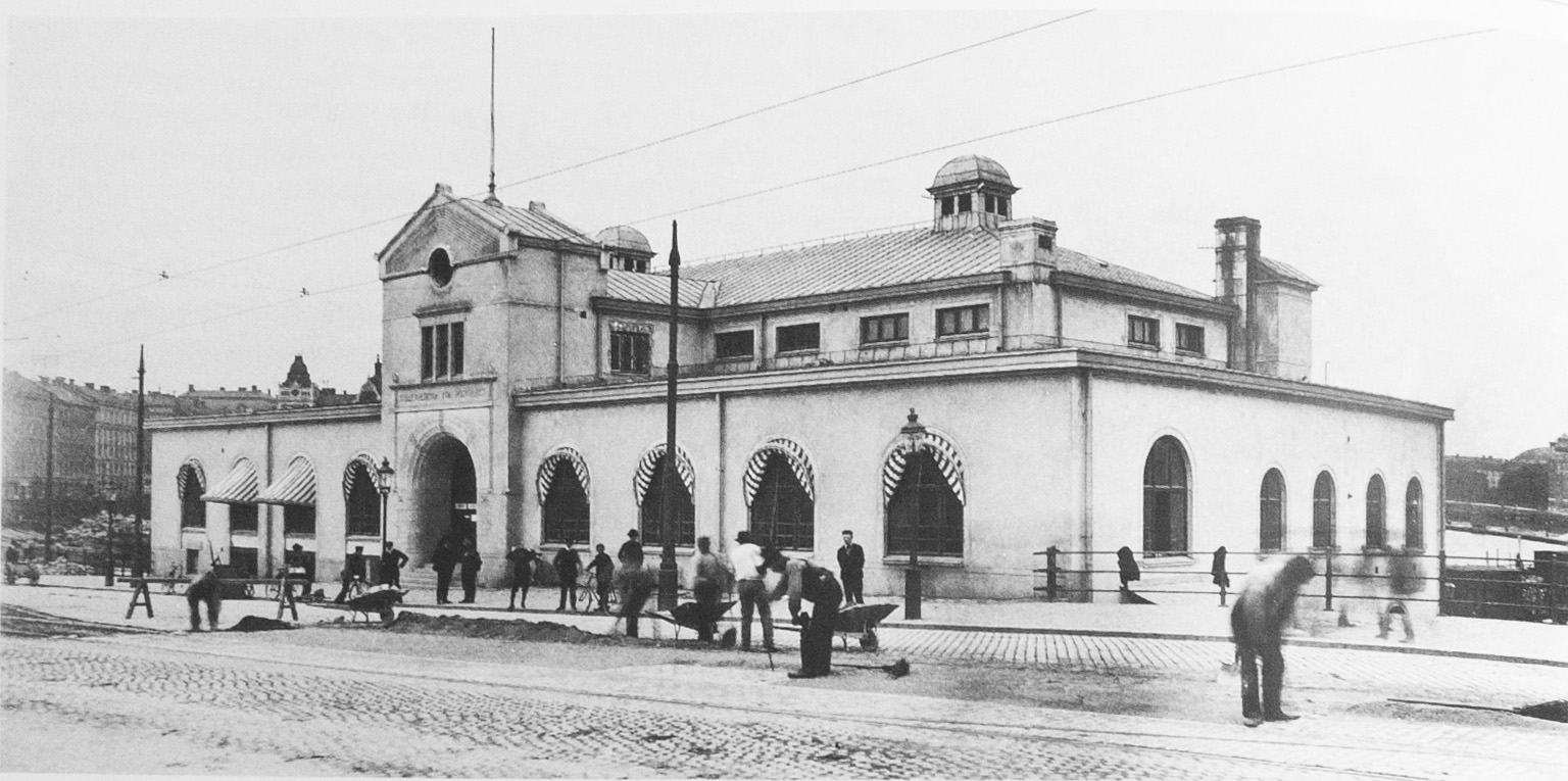 Pakettullhuset vid Kungsgatan, Stockholm. Byggnadsår 1908. Arkitekt Ferdinand Boberg